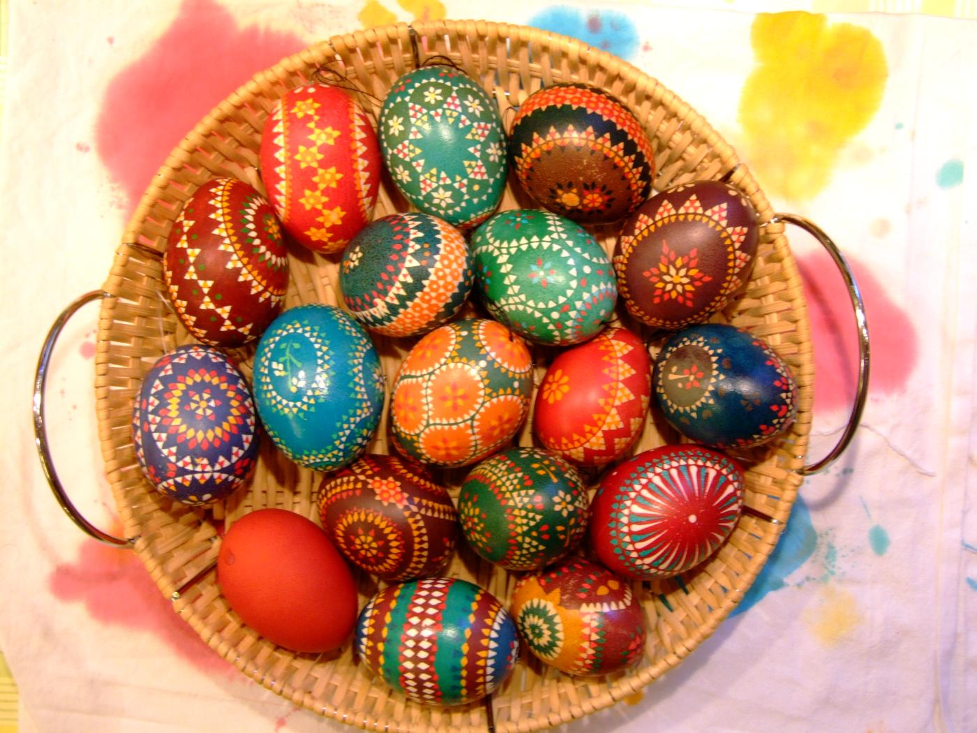 Sorbische Ostereier mit traditionellen Motiven